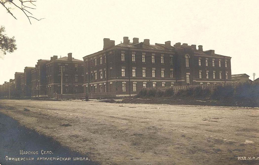 Ecole d'artillerie (Tsarskoe Selo)